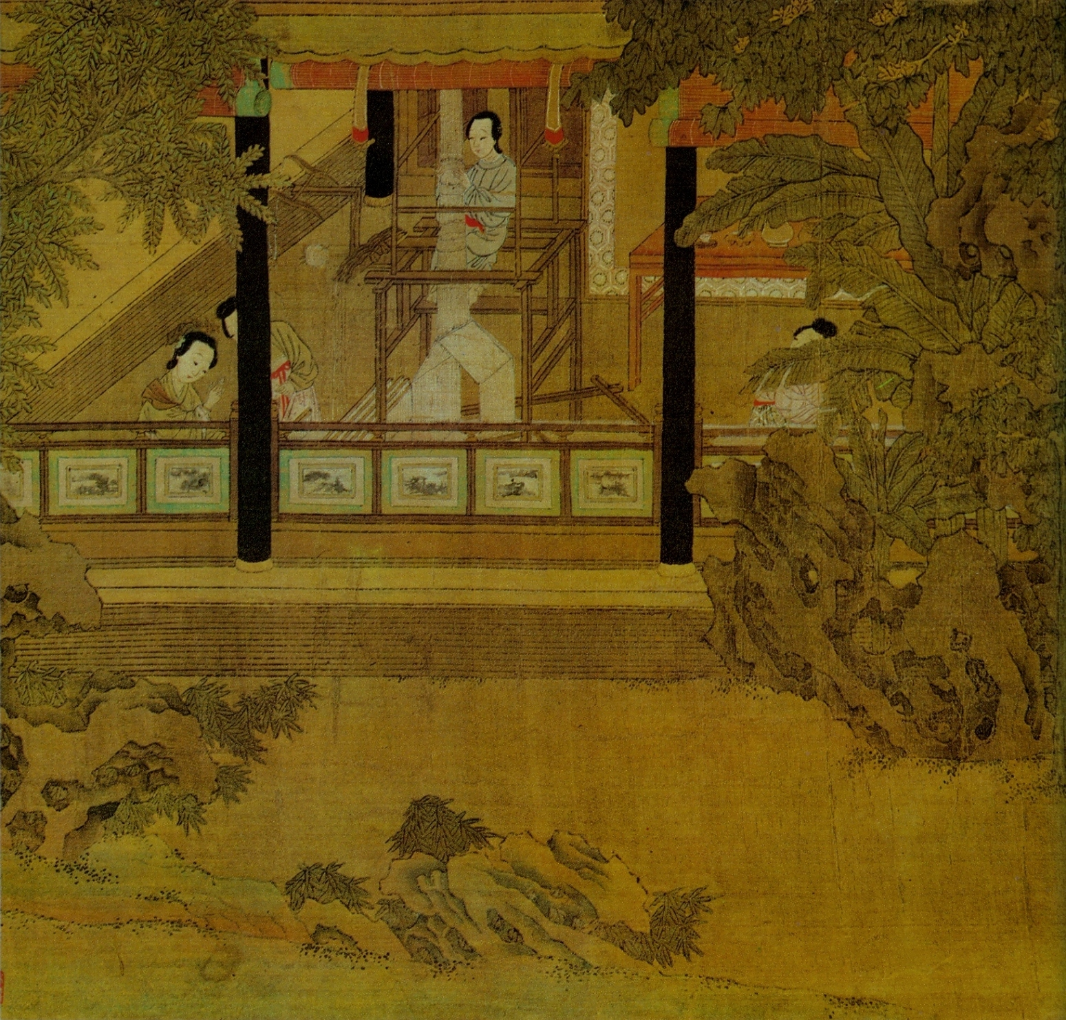 Цю Ин. Поэма о покинутой жене. Деталь. Музей Востока. Москва